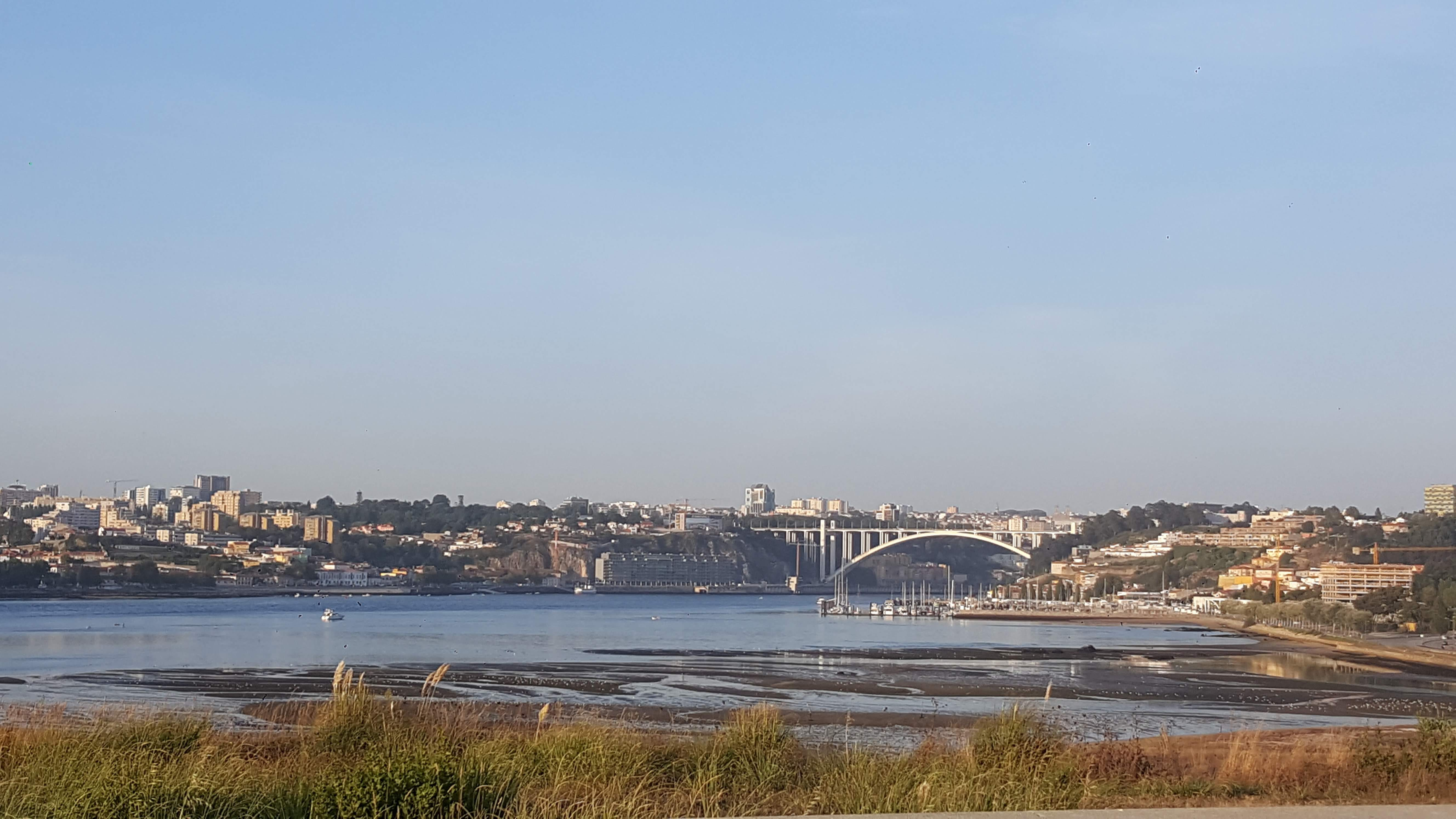 Reserva Natural Local do Estuário do Douro This is a photography of a protected area of Portugal indexed in the World Database on Protected Areas with the ID: 555514082 (WDPA)